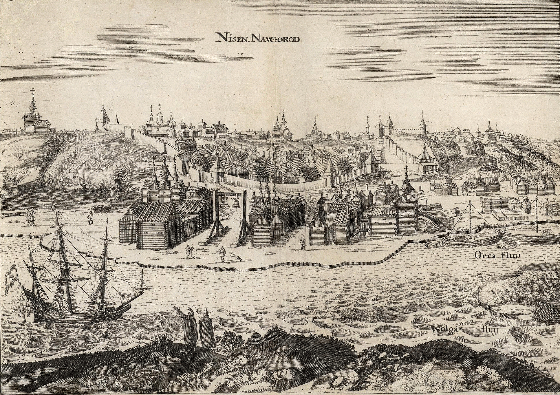 Нижний Новгород в начале 17 векаВид Нижнего Новгорода из книги А.Олеария "Описание путешествия в Московию", Шлезвиг, 1656